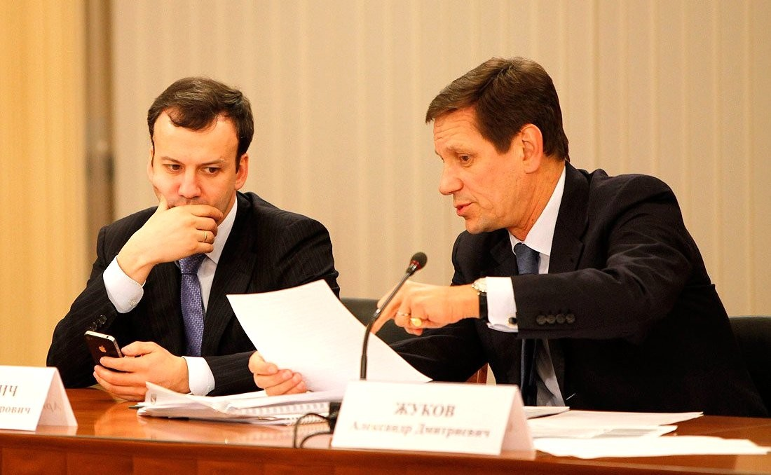 На совещании по вопросам государственной политики в сфере занятости населения. Помощник Президента Аркадий Дворкович и Заместитель Председателя Правительства Александр Жуков